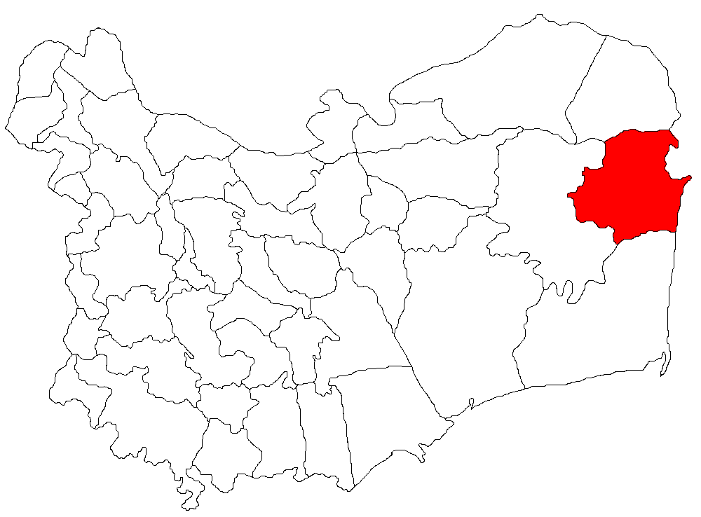 Categorie:Hărţi ale judeţului Tulcea